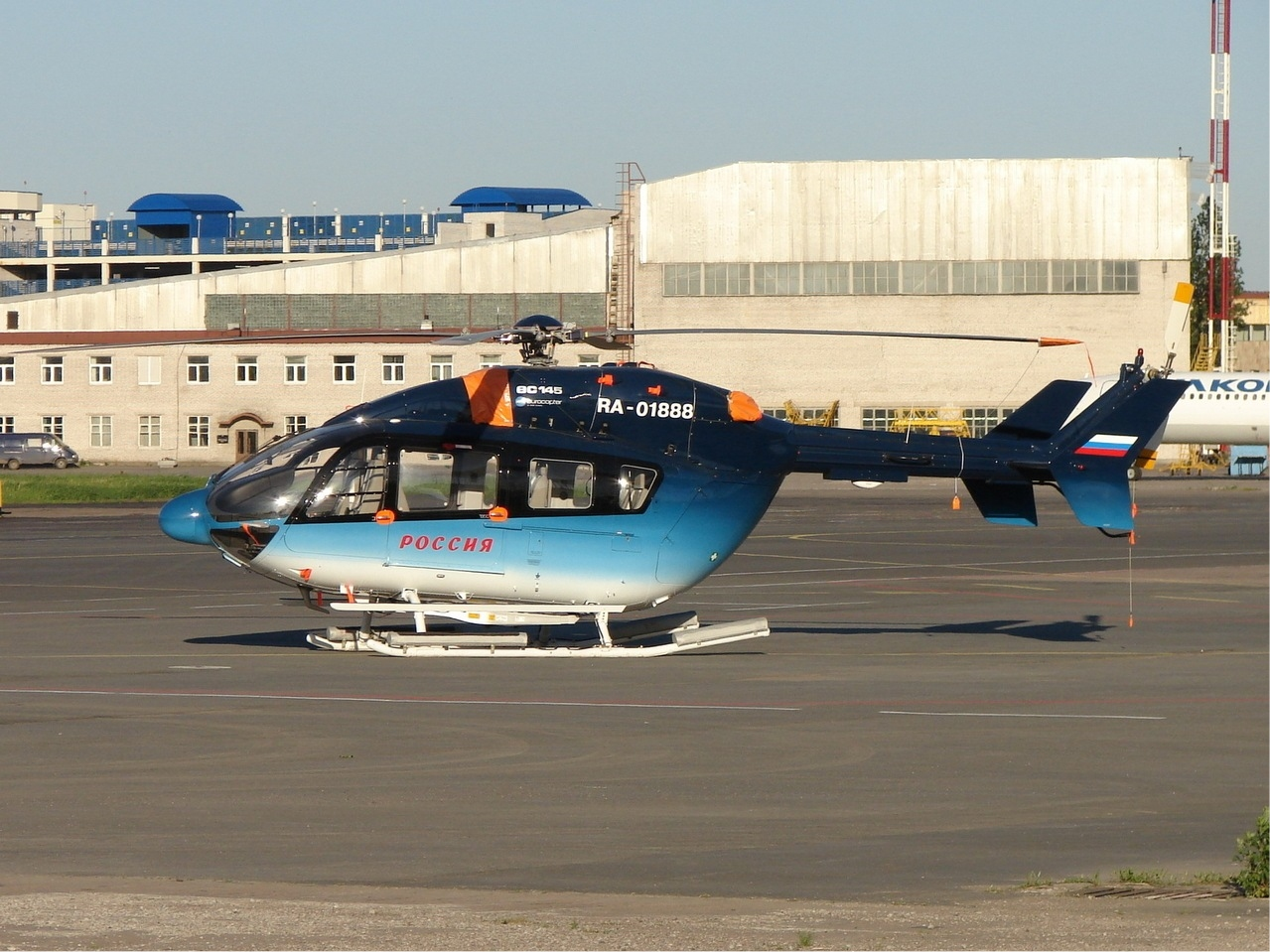 Rossiya Eurocopter EC-145